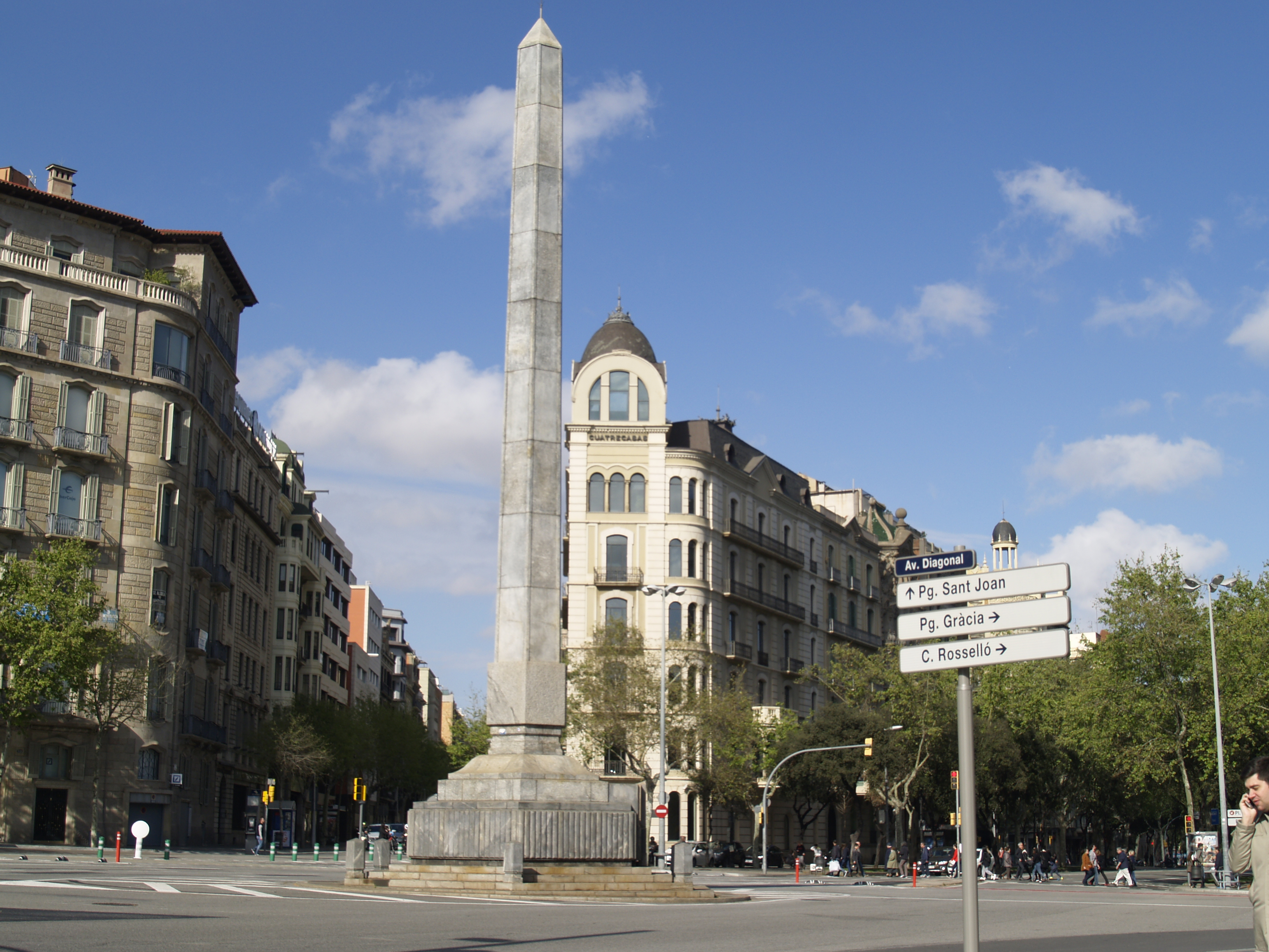 {nombre }